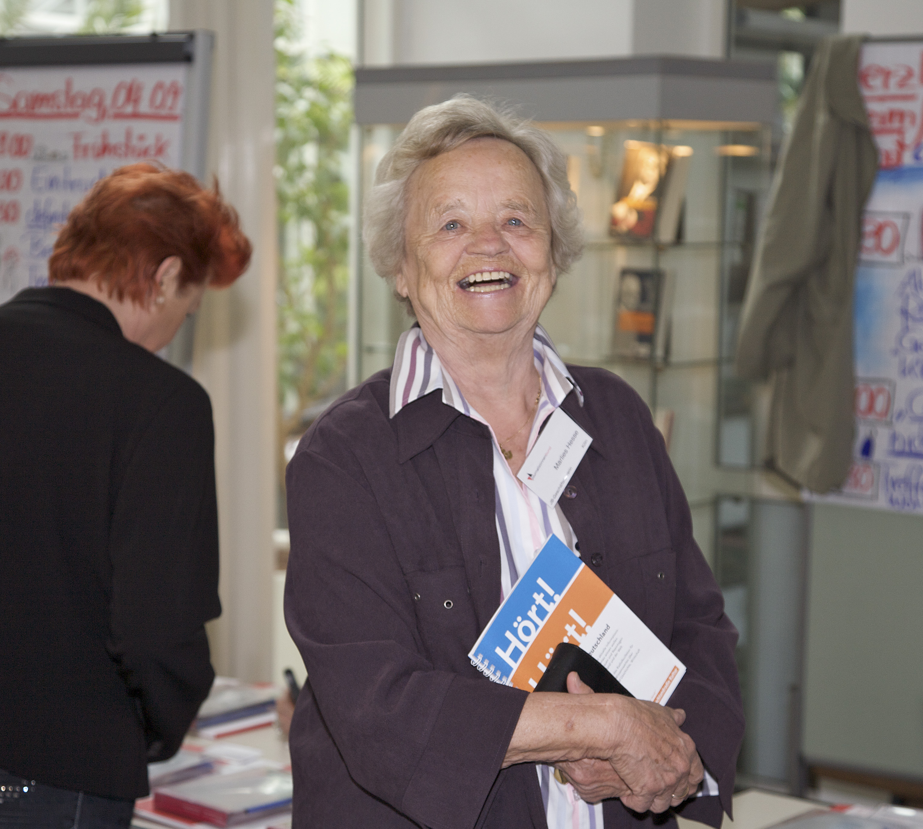 Porträt Marlies Hesse